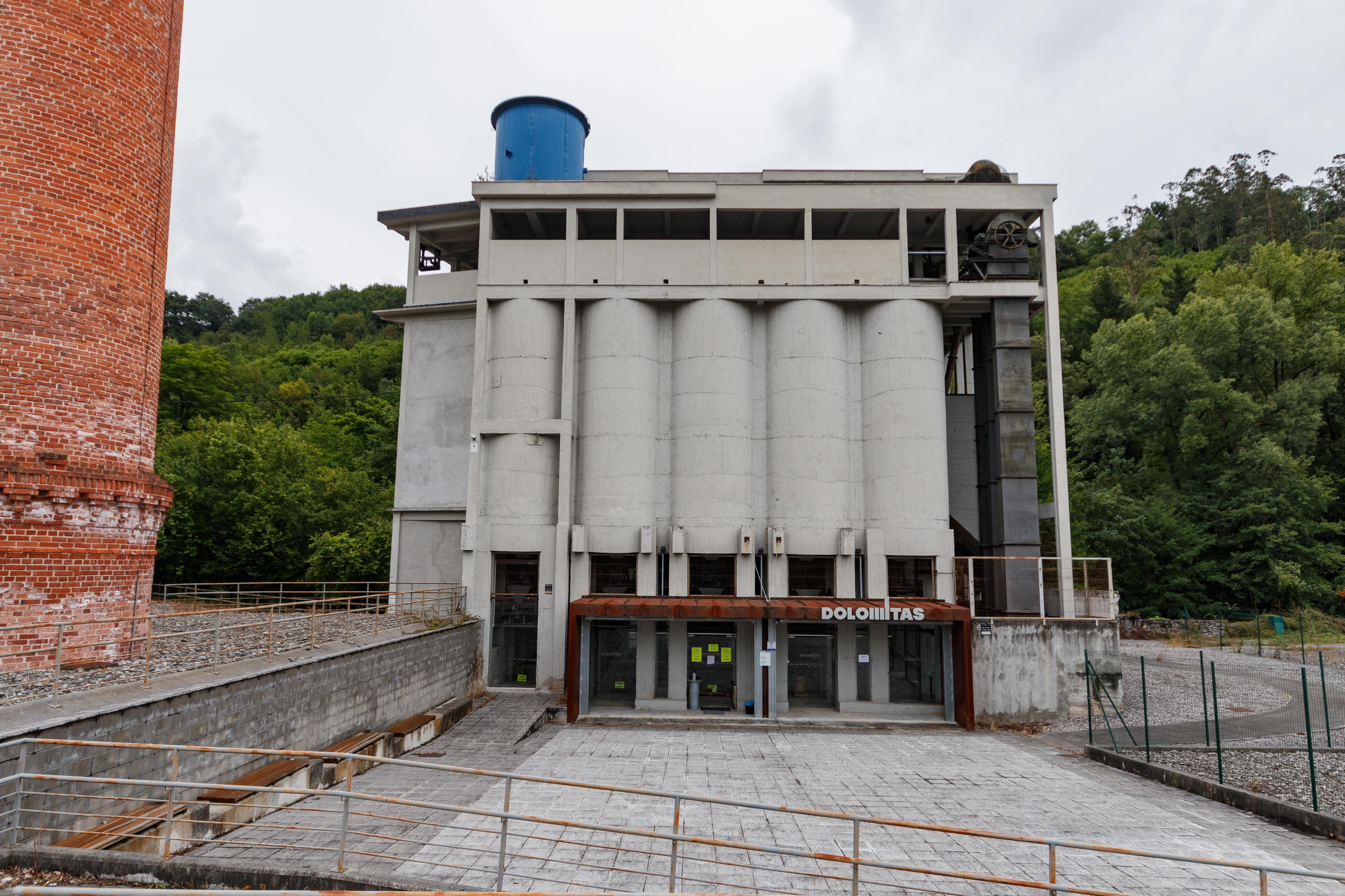 Dolomitas del Norte S.L. Irudi hau Wikibizi kanpainaren baitan igo da, Euskal Wikilarien Kultura Elkarteak 2020an deitutako argazki lehiaketa hirukoitza. Helburua, Euskal Herria hobeto ezagutzen laguntzea da.Lagundu zuk ere irudi hau dagokion artikuluetan txertatzen.